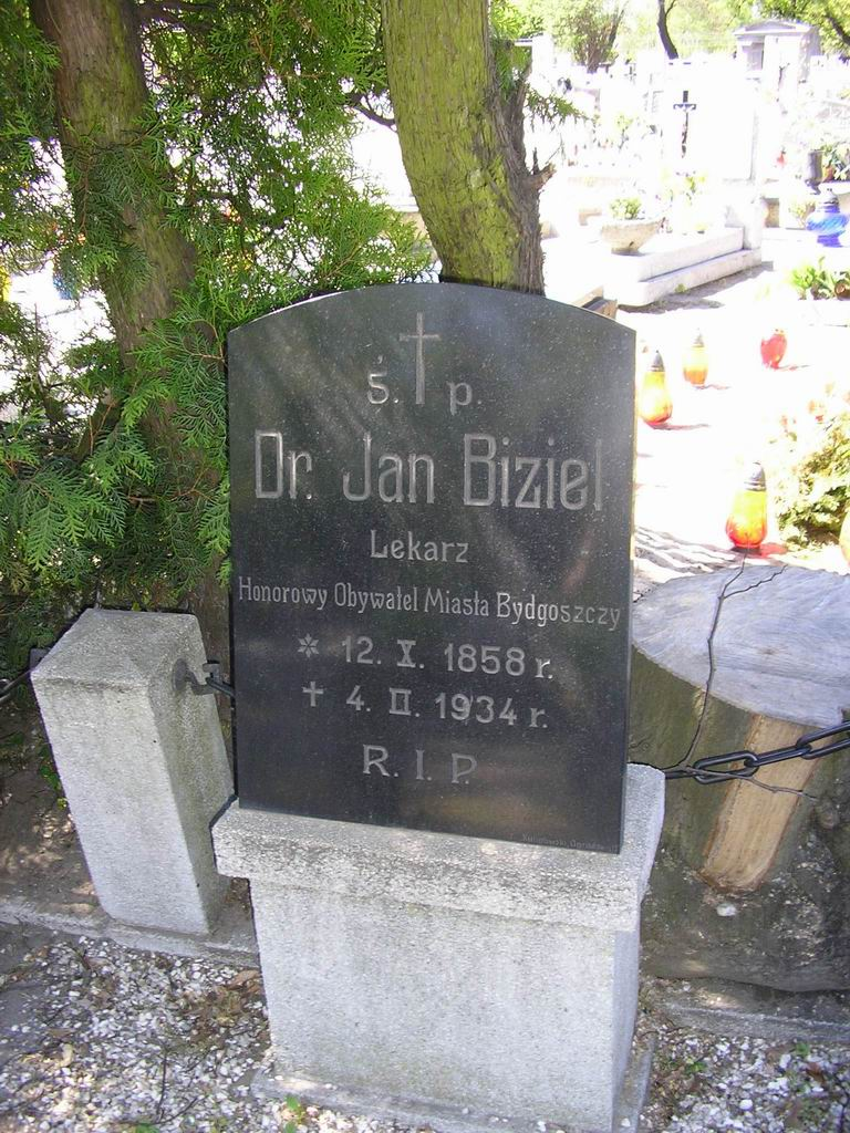 Jan Biziel's grave on Nowofarny Cemetery, Bydgoszcz